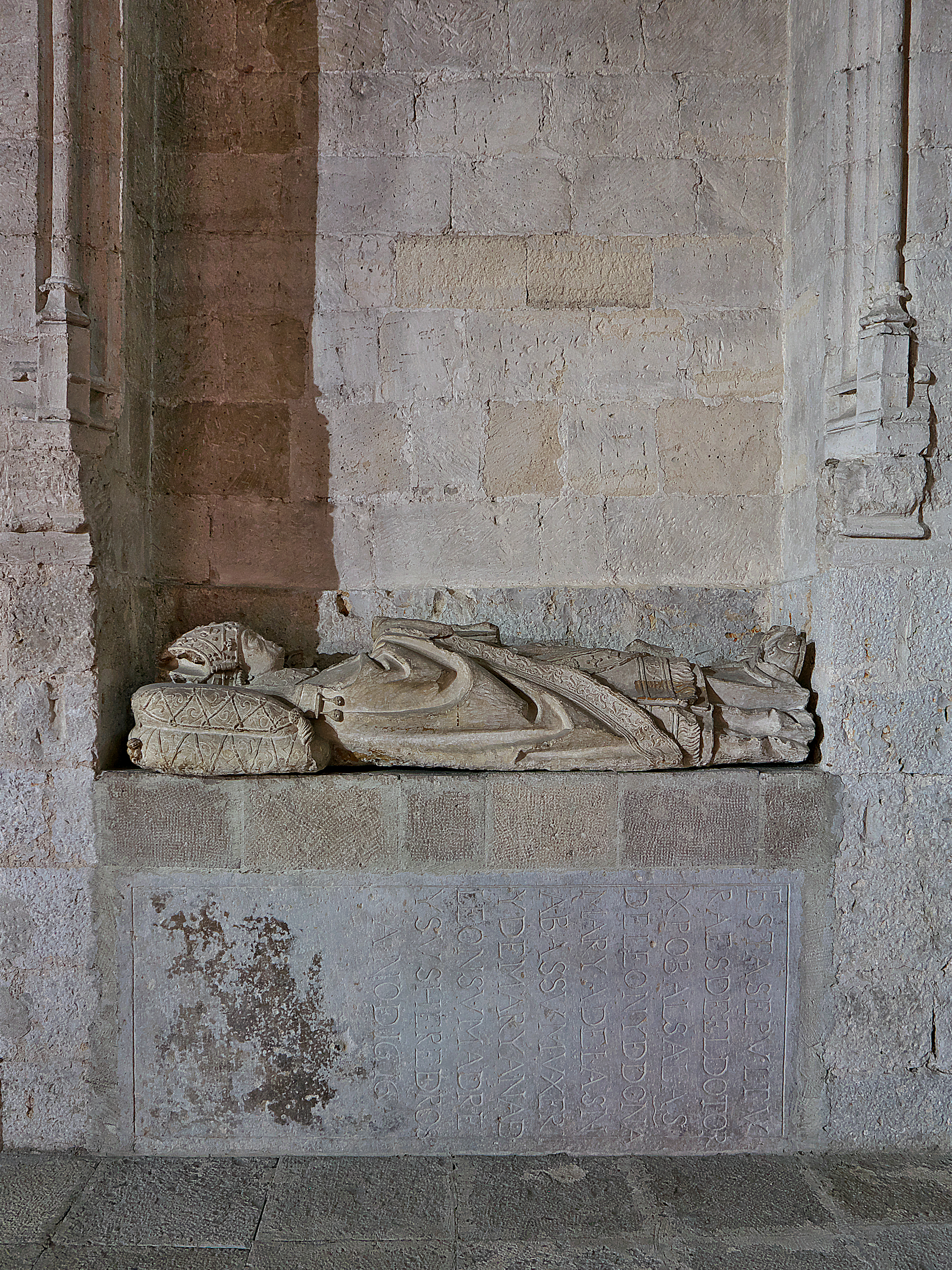 Iglesia del monasterio de San Benito el Real (Valladolid). Ábside de San Marcos, nave del Evangelio. Nueva ubicación (1600) del sepulcro del obispo de León (1485-1500), Alonso de Valdivieso (†1500), por traslado del primitivo en la capilla mayor de la iglesia.